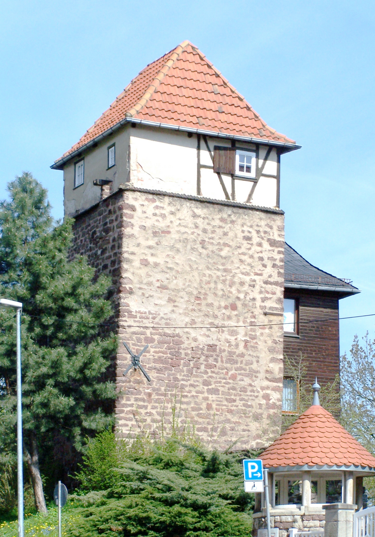 Der Eisenacher Glockenturm - ein Wahrzeichen der Stadt und Teil der mittelalterlichen Stadtbefestigung. An der südwestlichen Ecke erkennt man den in einem X-förmigen Spruchband eingefügten "Neidkopf" - heute belächeltes Zeichen eines erbitterten Nachbarschaftsstreites.